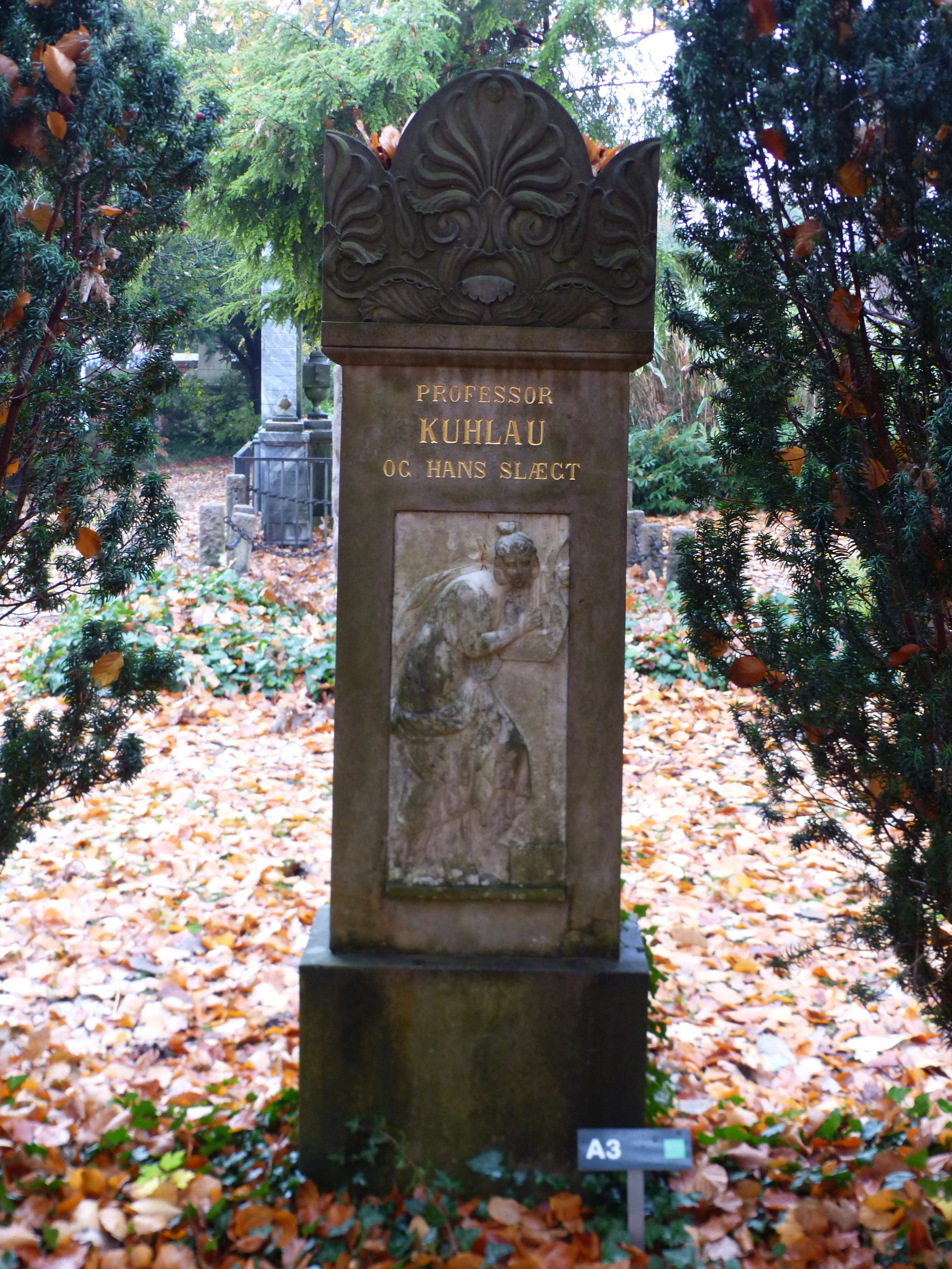 Gravsten Friedrich Kuhlau 2018-11-11